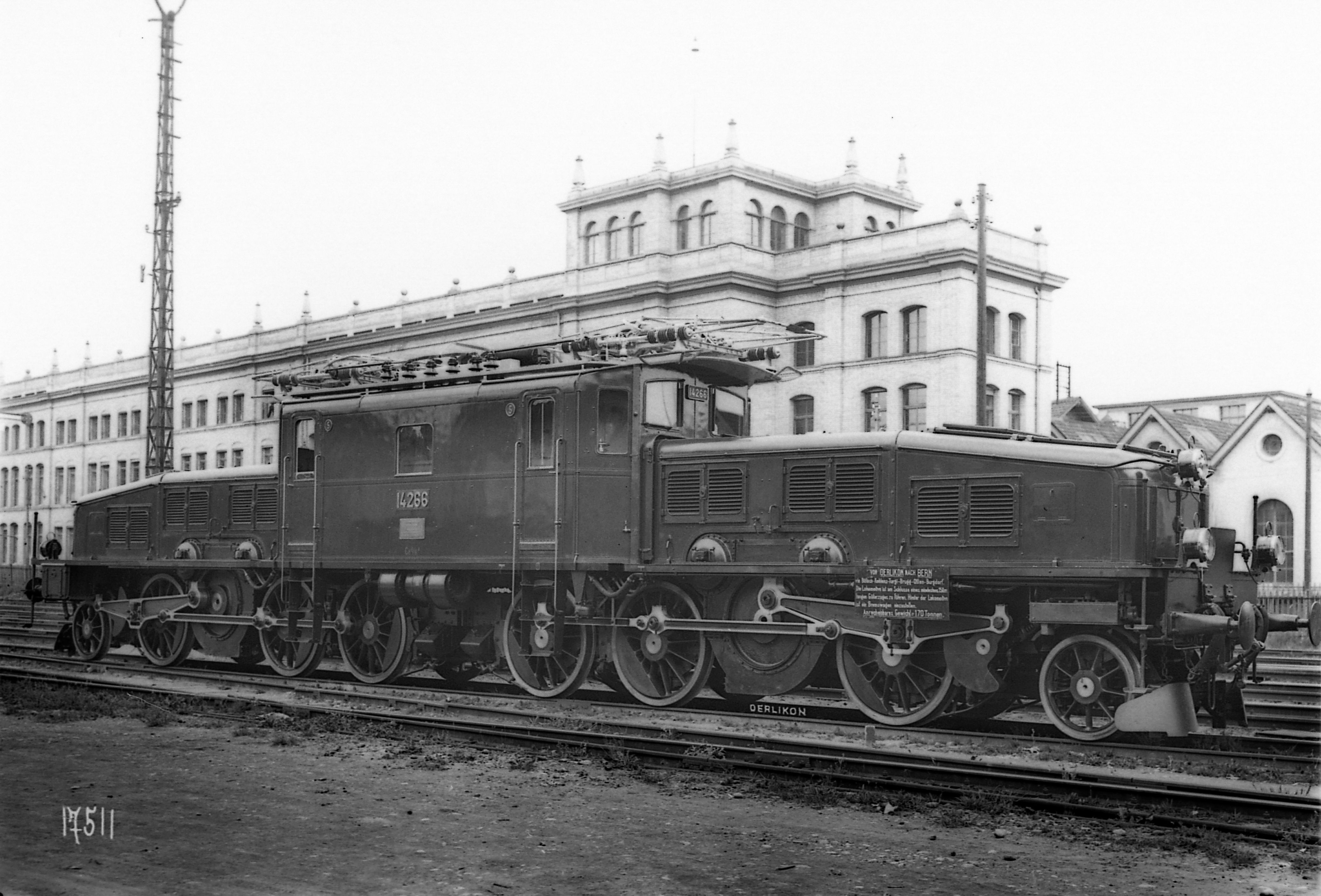 Die soeben festgestellte Ce 6/8 II 14266 wird von Oerlikon nach Bern überführt, da im Raum Zürich noch keine Strecken elektrifiziert sind. An der Lok ist eine Tafel mit Informationen zur Überführung angebracht. Ihr Wortlaut ist Von Oerlikon nach Bern via Bülach–Koblenz–Turgi–Brugg–Olten–Burgdorf. Die Lokomotive ist am Schluss eines mindestens 150 m langen Güterzuges zu führen. Hinter der Lokomotive ist ein Bremswagen einzustellen. Anwendbares Gewicht – 170 Tonnen.